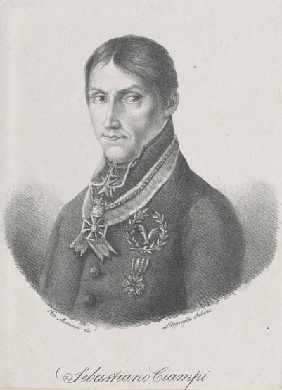 Sebastiano Ciampi, litografia, Wien, Österreichische Nationalbibliothek